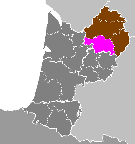 Maps of arrondissements and cantons of France: Département de la Dordogne - Arrondissement de Bergerac.PNG (Région Aquitaine)